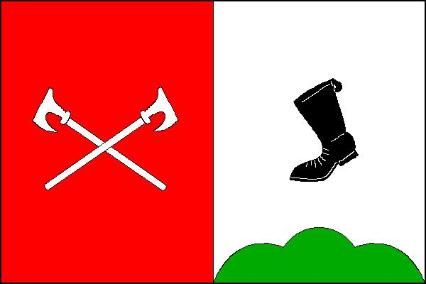 Vlajka obce Zadní Chodov